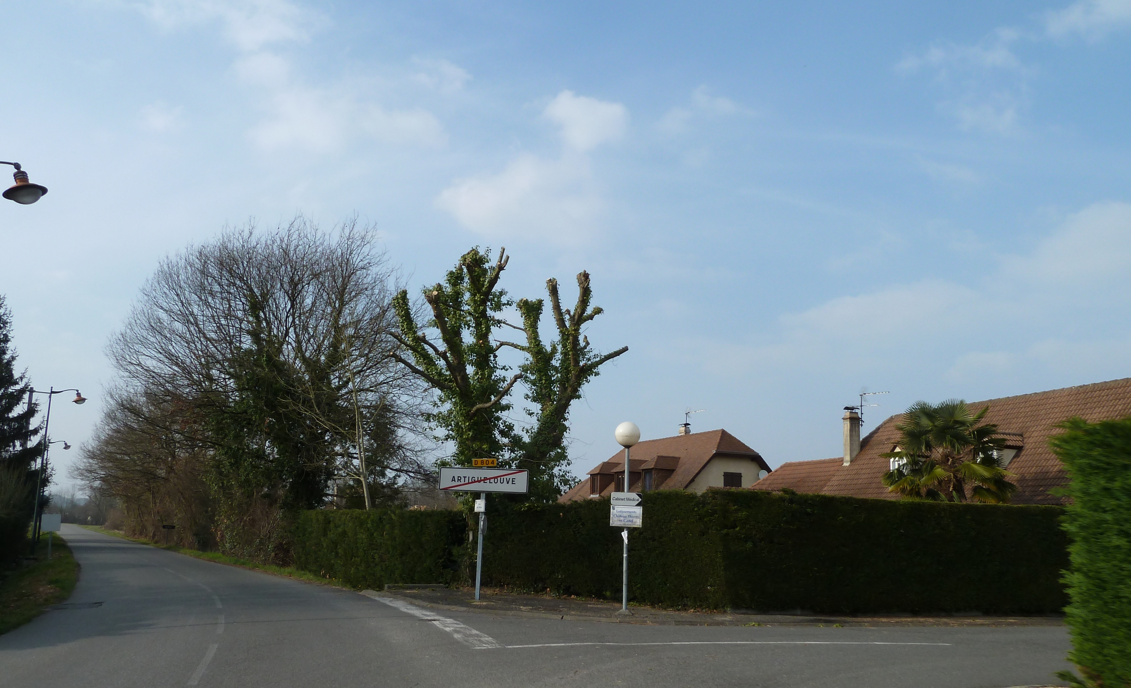 Sortie d'Artiguelouve